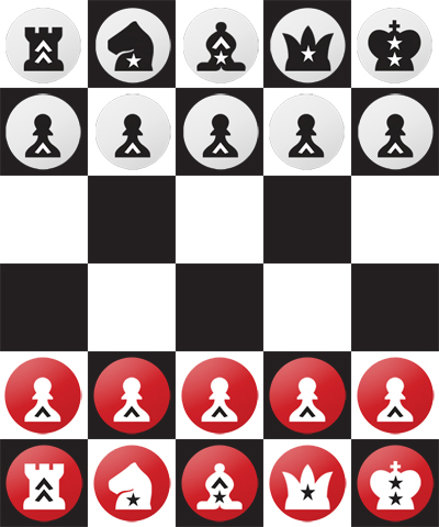 Chess Attack brikker og oppsett.